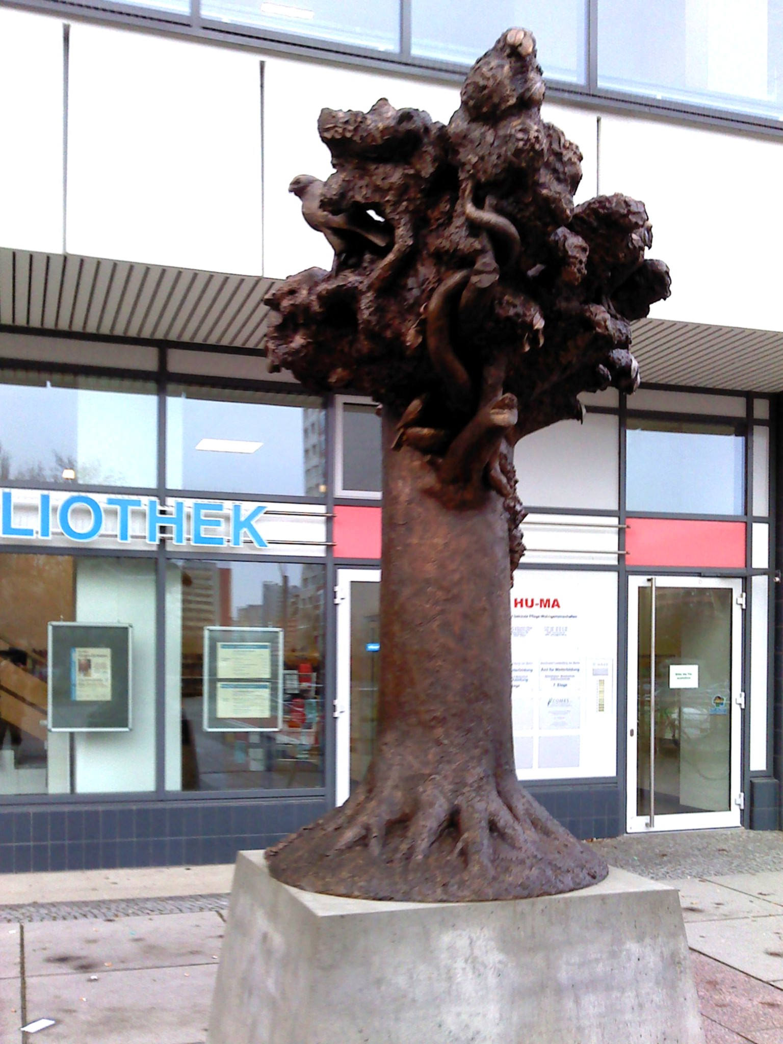 Berlin-Fennpfuhl, “Baumdenkmal” - gesamt